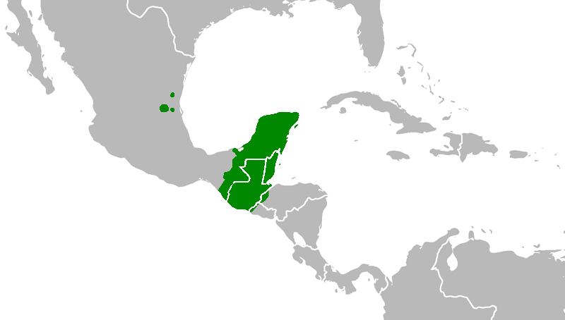 Location of Mayan speaking populations